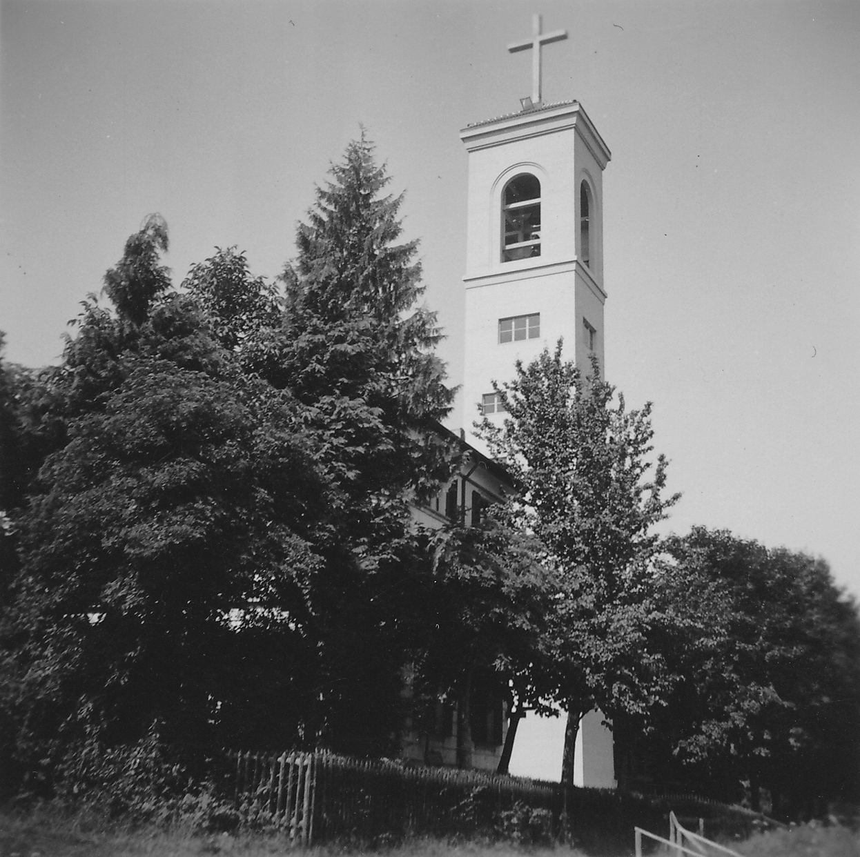 Römisch-katholische Pfarrei Heilig Kreuz Zürich-Altstetten, neu erbauter Kirchturm um 1937